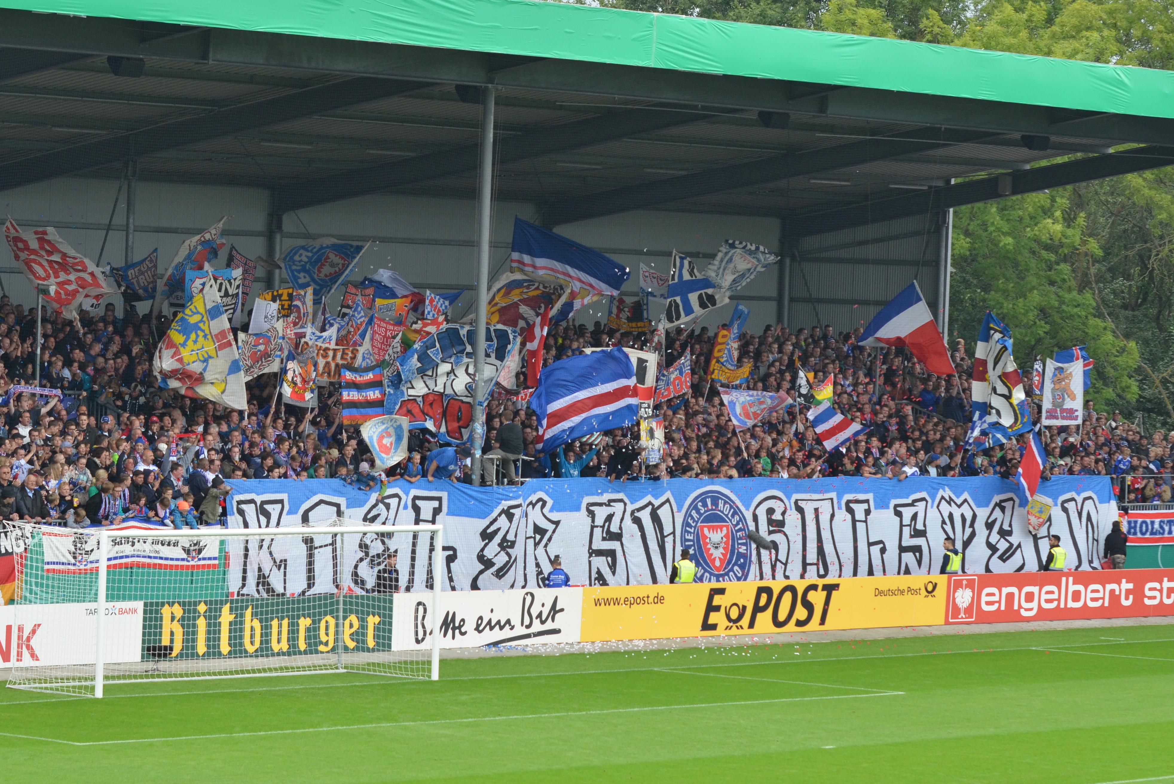 Holstein-Stadion Westribüne Spiel gegen 1860 München